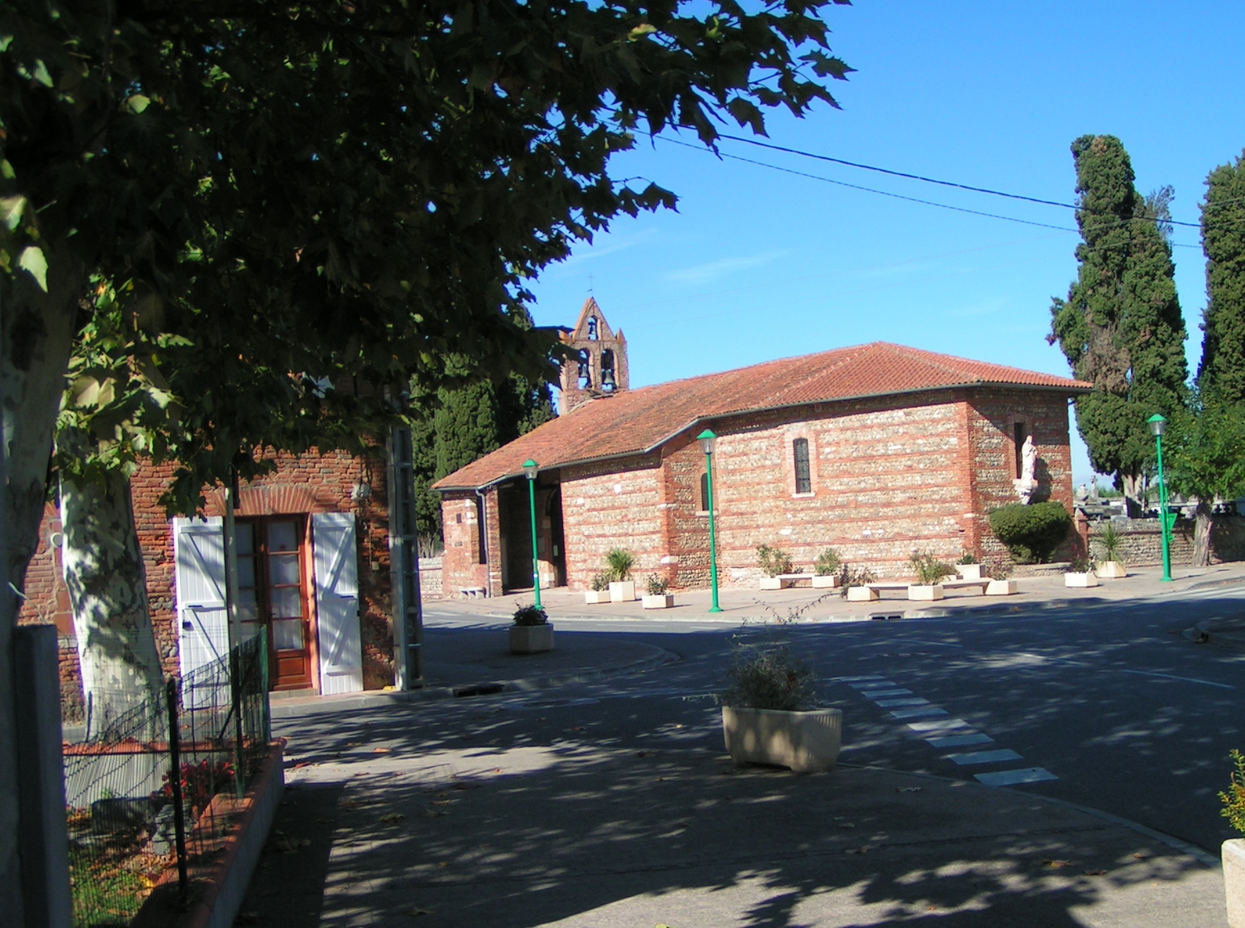 Église de Peyssies Catégorie: Image GFDL